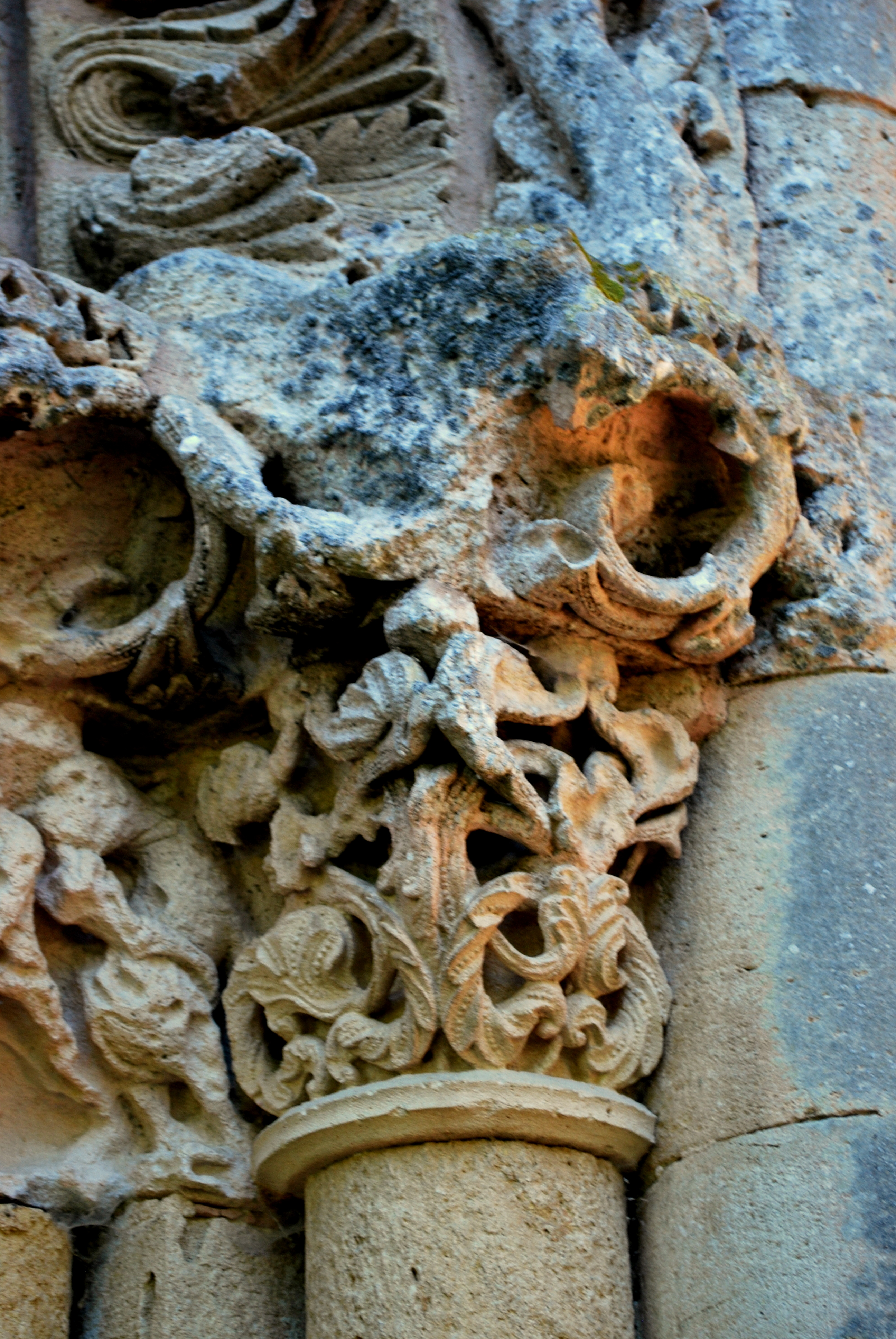 Blasimon église St Nicolas portail